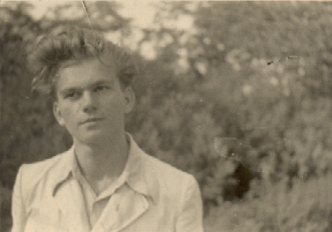 český filosof Karel Kosík